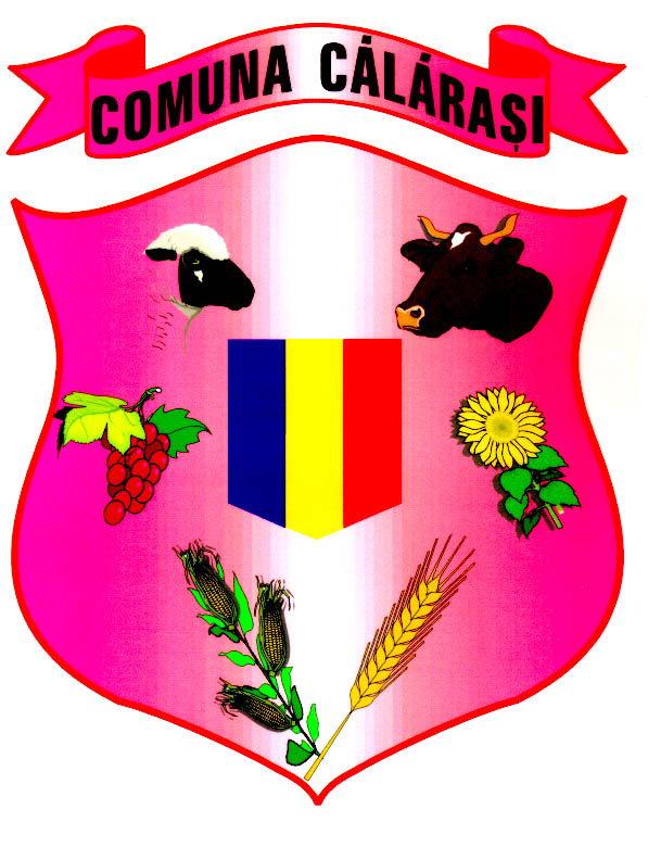 Coat of arms of Călărași, Romania